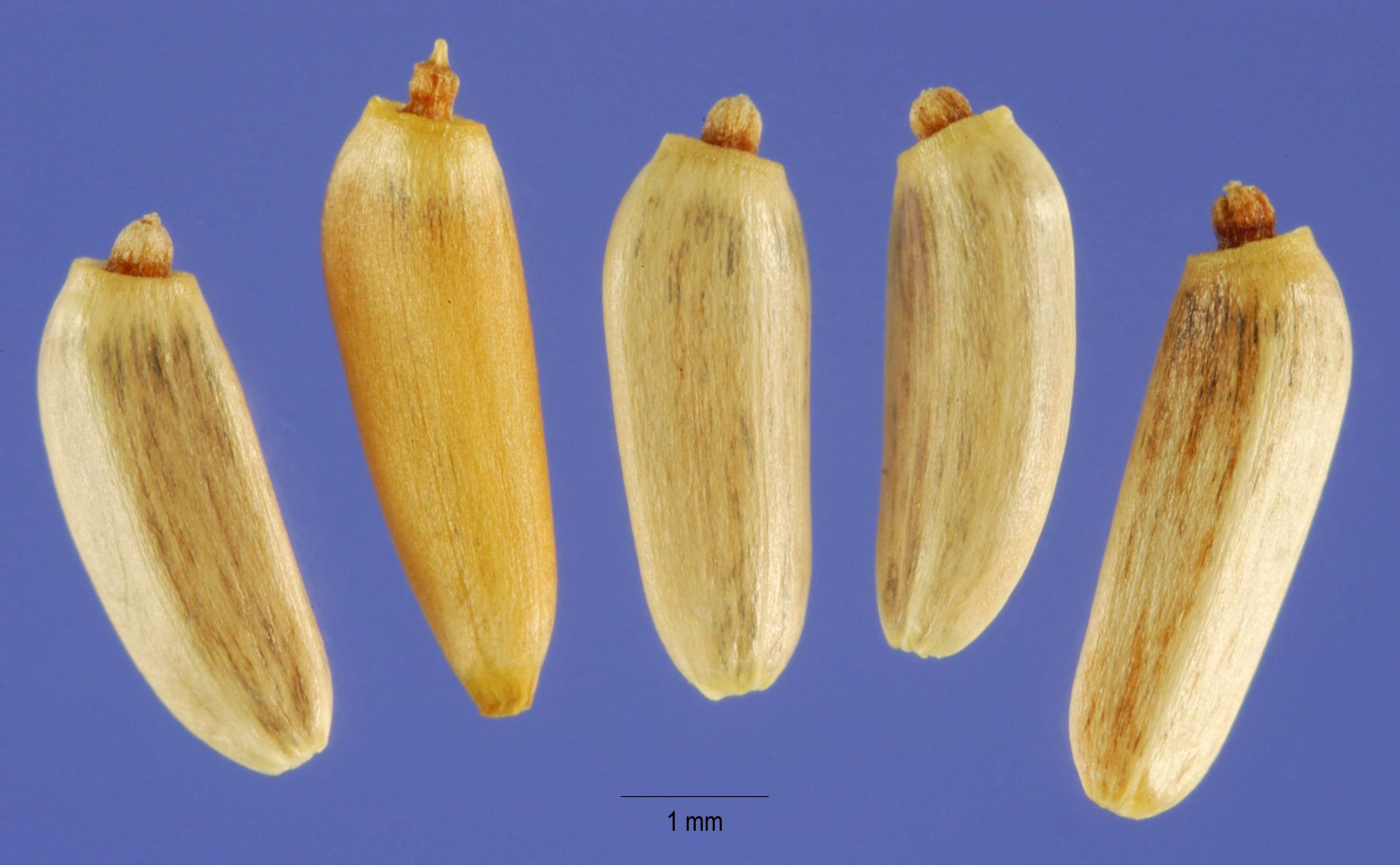 Cirsium vulgare - Cipselas sueltas desprovistas de su vilano plumoso caedizo.